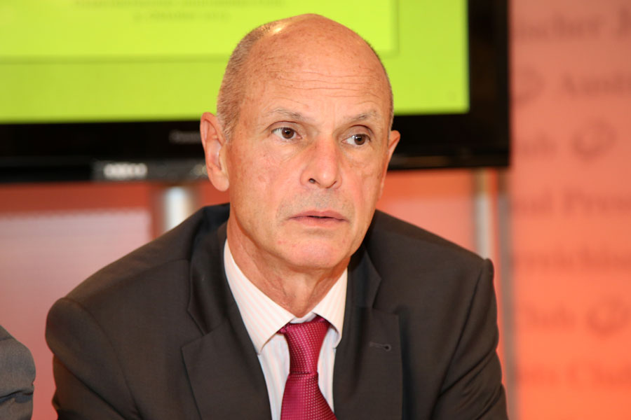 Der österreichische Journalistenclub lud zu einem Vortrag von Dr. Kurt Scholz über Sexuelle Gewalt in Kirche und Gesellschaft - Die Arbeit der "Klasnic-Kommission"